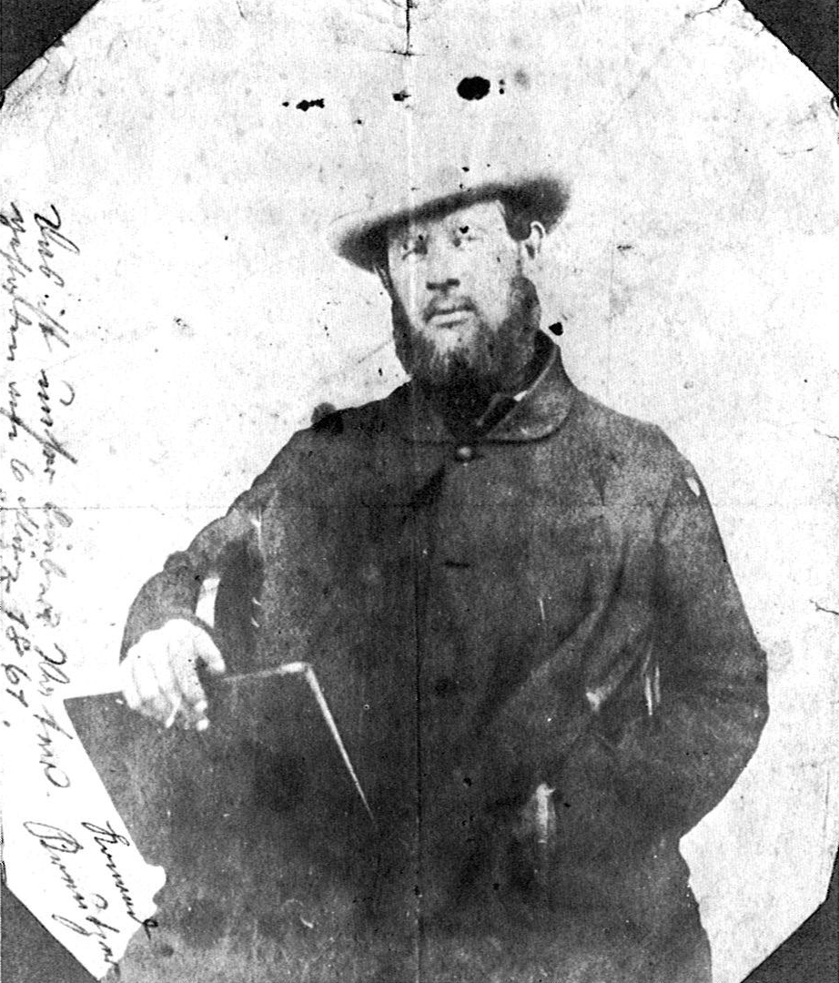 Salzpapierkopie des Landschaftsmalers Conrad Kreuzer